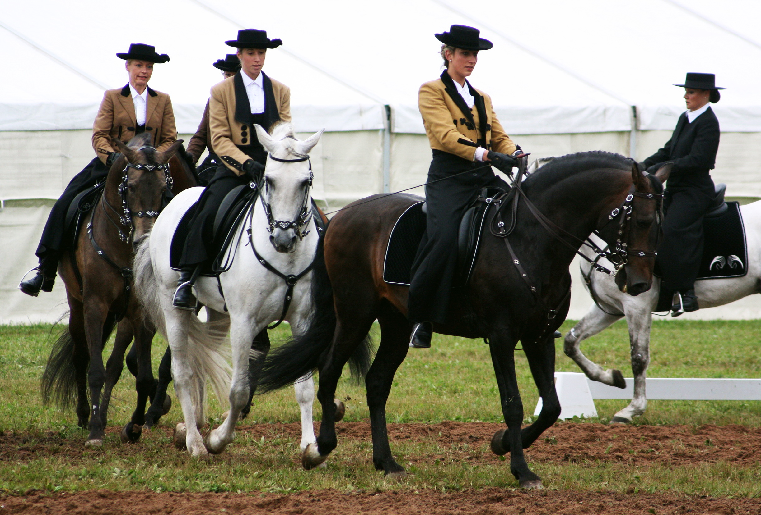 Pferde mit Reiterinnen. Pferderasse Lusitano. Veranstaltung Pferd International 2011